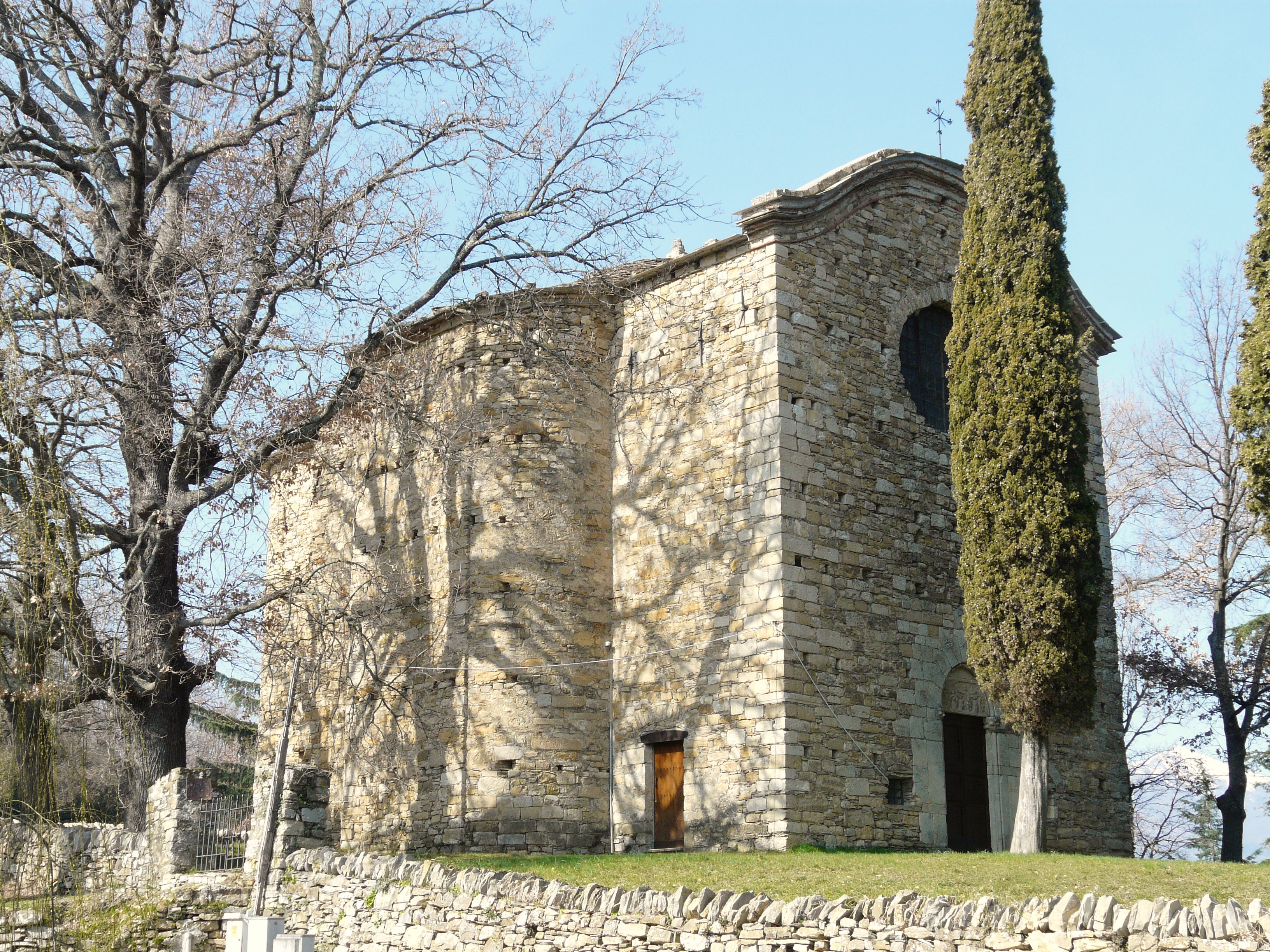 Chiesa di Santo Stefano, Lucinasco, Liguria, Italia